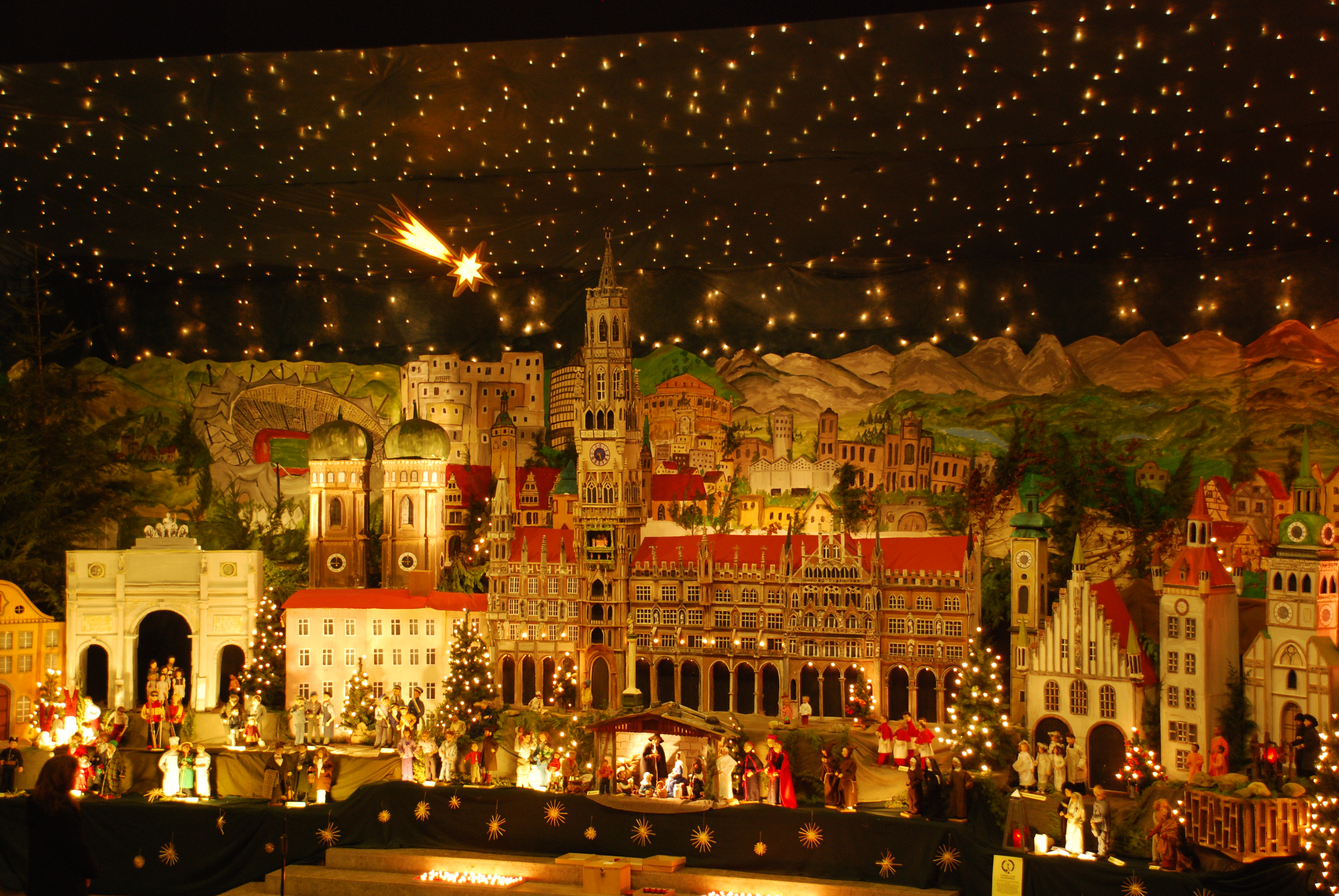 Weihnachtskrippe im Renninger Teilort Malmsheim